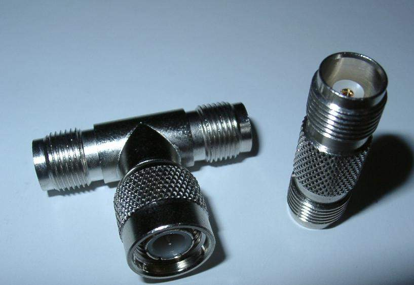 TNC-Steckverbinder Sonstiges